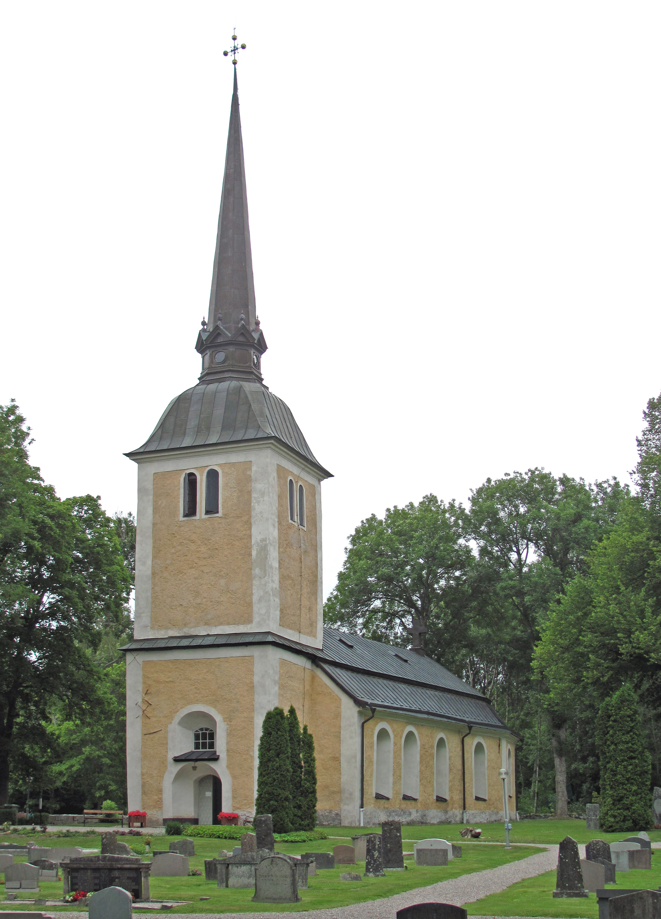 Himmeta kyrka